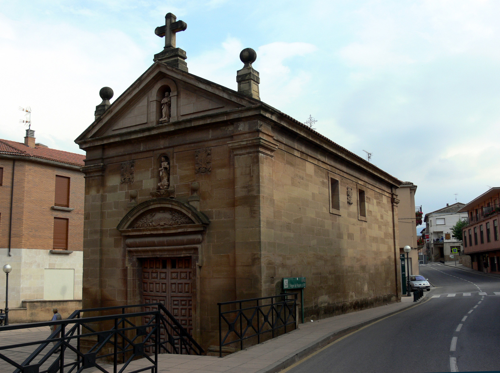 Ermita del Rosario - Baños de Río Tobía, La Rioja - España.